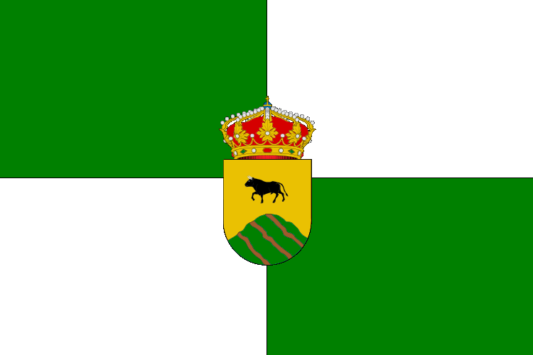 Bandera de Menasalbas (Toledo)